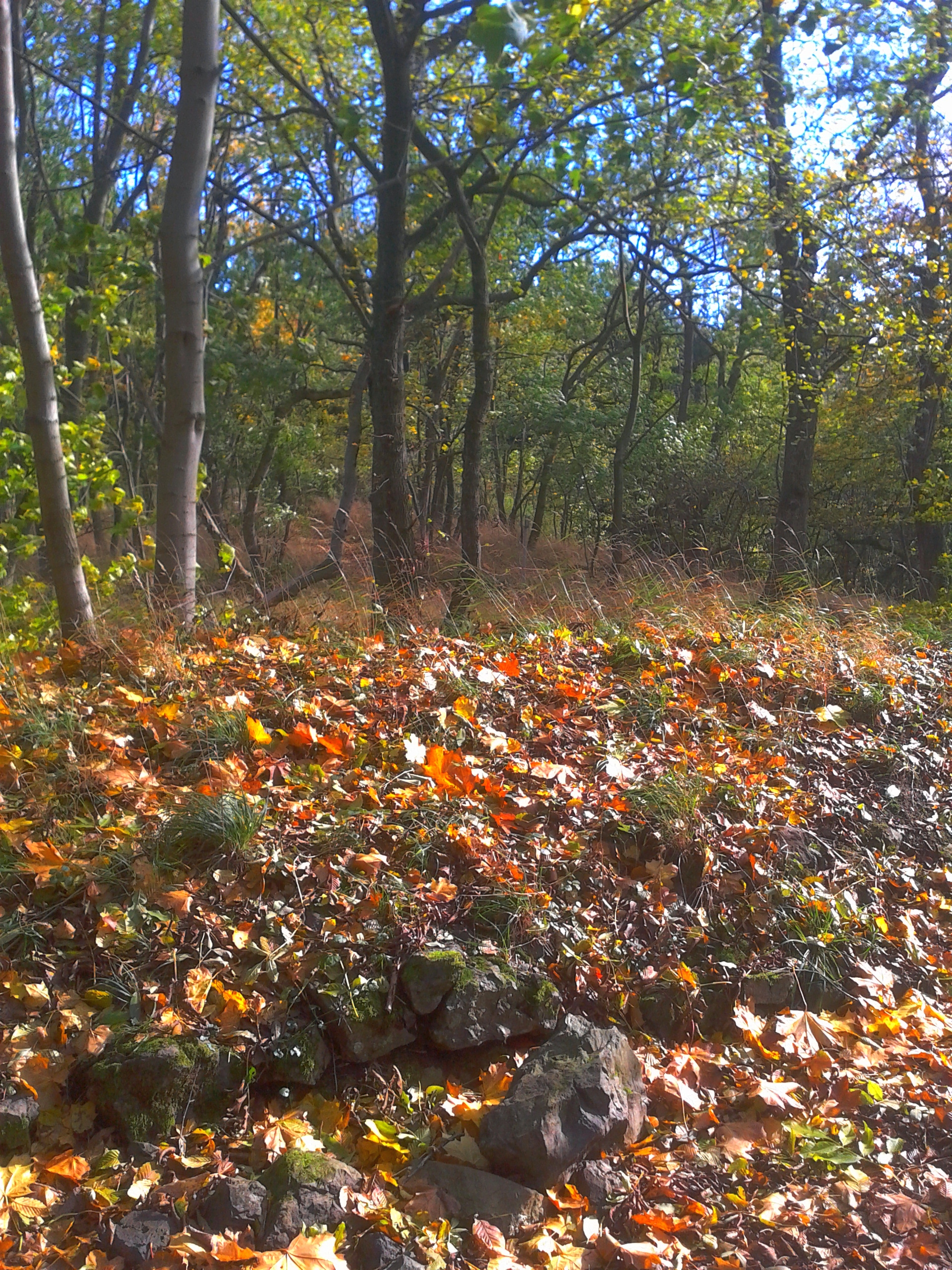 Rest der Güntersburg bei Guentersberge